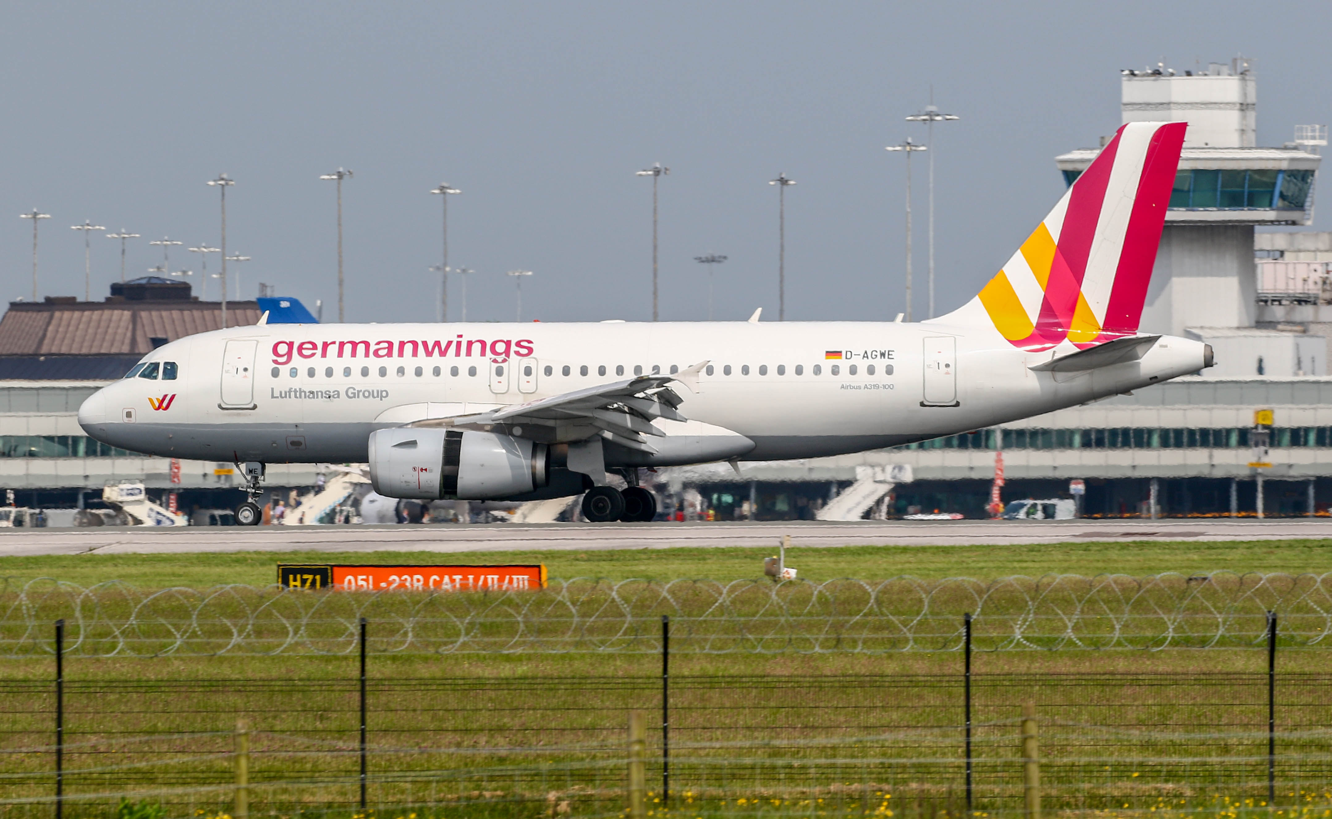 Germanwings A319